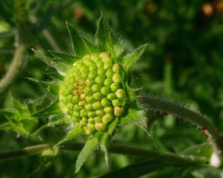 Knautia arvensis